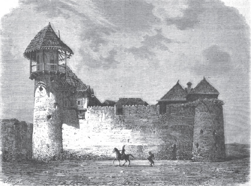 Северо-западная часть Шушинской крепости